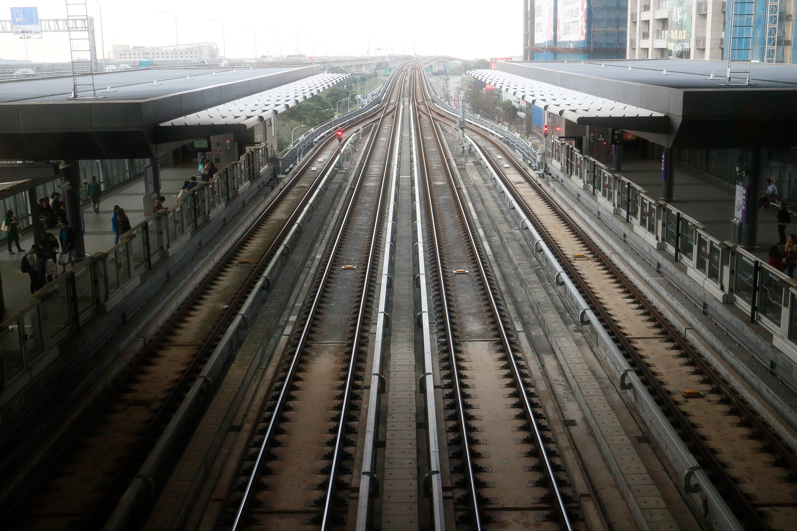 桃園捷運林口站第一月台軌道。